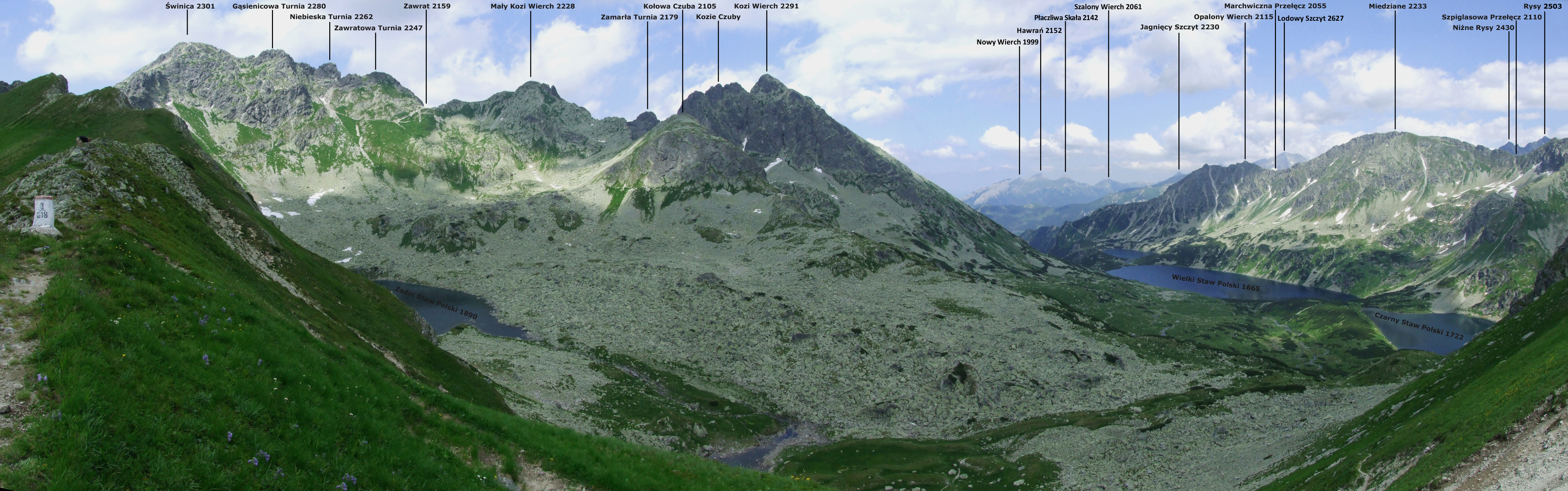 Panorama z Gładkiej Przełęczy